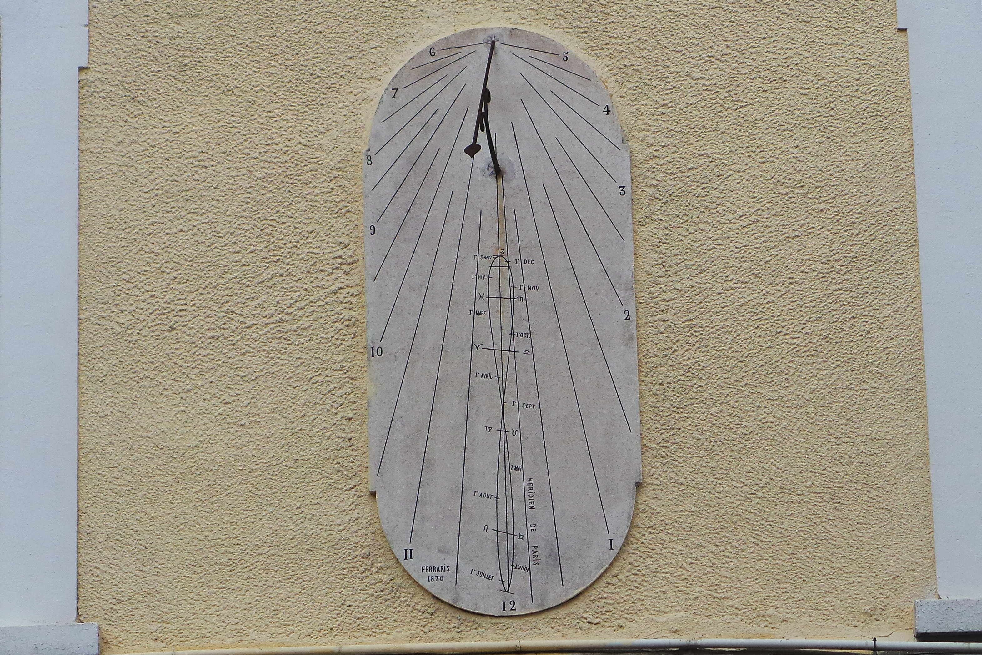 Cadran solaire du 81 rue de la République / Rives, Isère, France